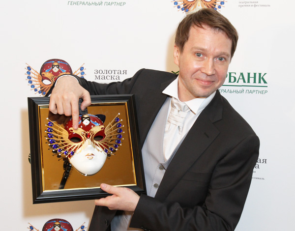 Фестиваль и премия «Золотая маска» 2012 года